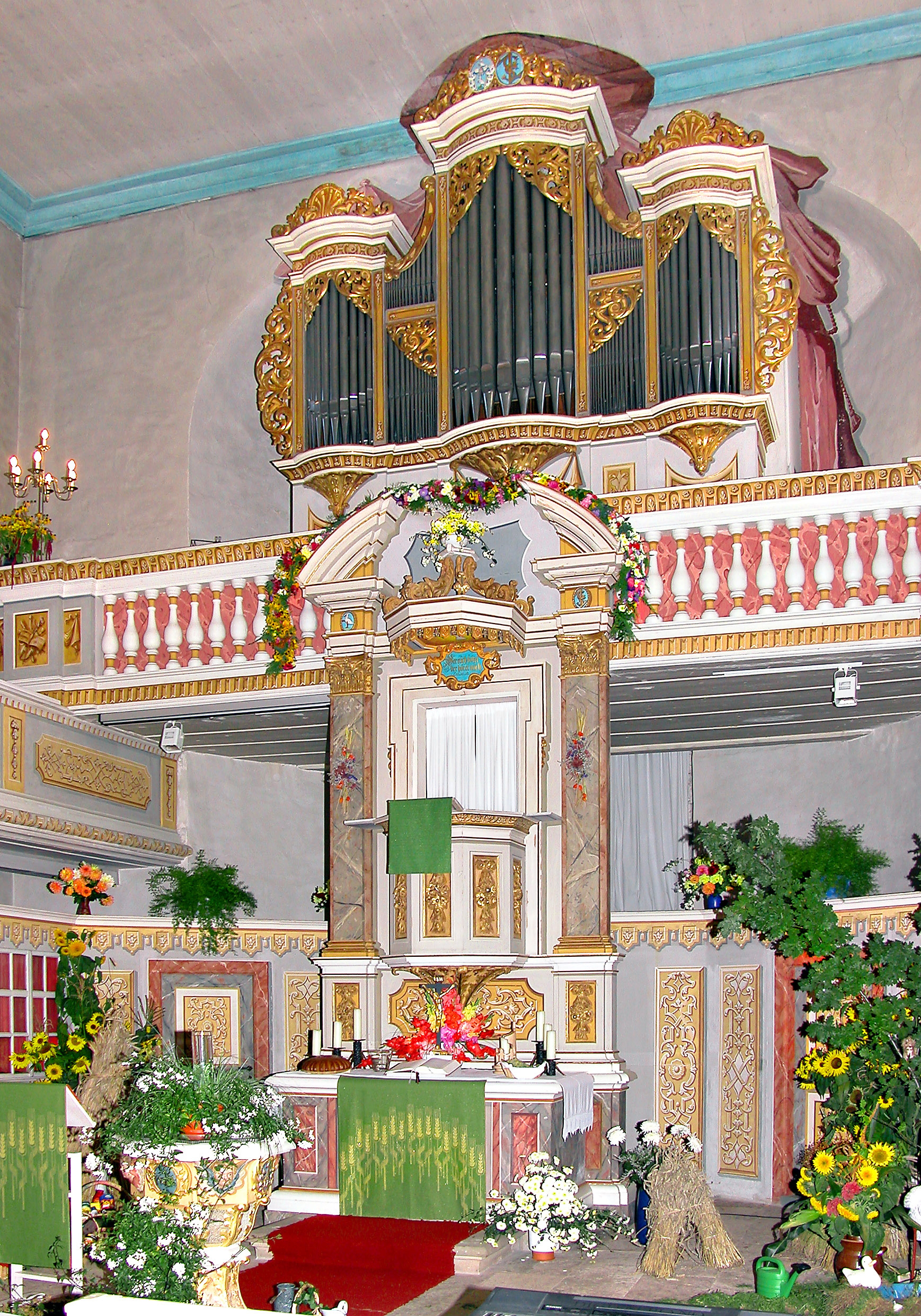 24.09.2006 09509 Forchheim (Pockau-Lengefeld), Kirchstraße: Evangelische Dorfkirche (Barock, 1719-26 von George Bähr und J. G. Fehre). Kanzelaltar (1725, bemalt v. Johann Christian Buzaeus) und Orgel (Gottfried Silbermann, 1726). Schmuck zum Erntedankfest. [DSCN11711.TIF]20060924290DR.JPG(c)Blobelt